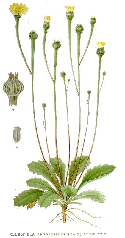 Original Description Klubbfibla, Arnoseris minima (L.) Schw. et K.